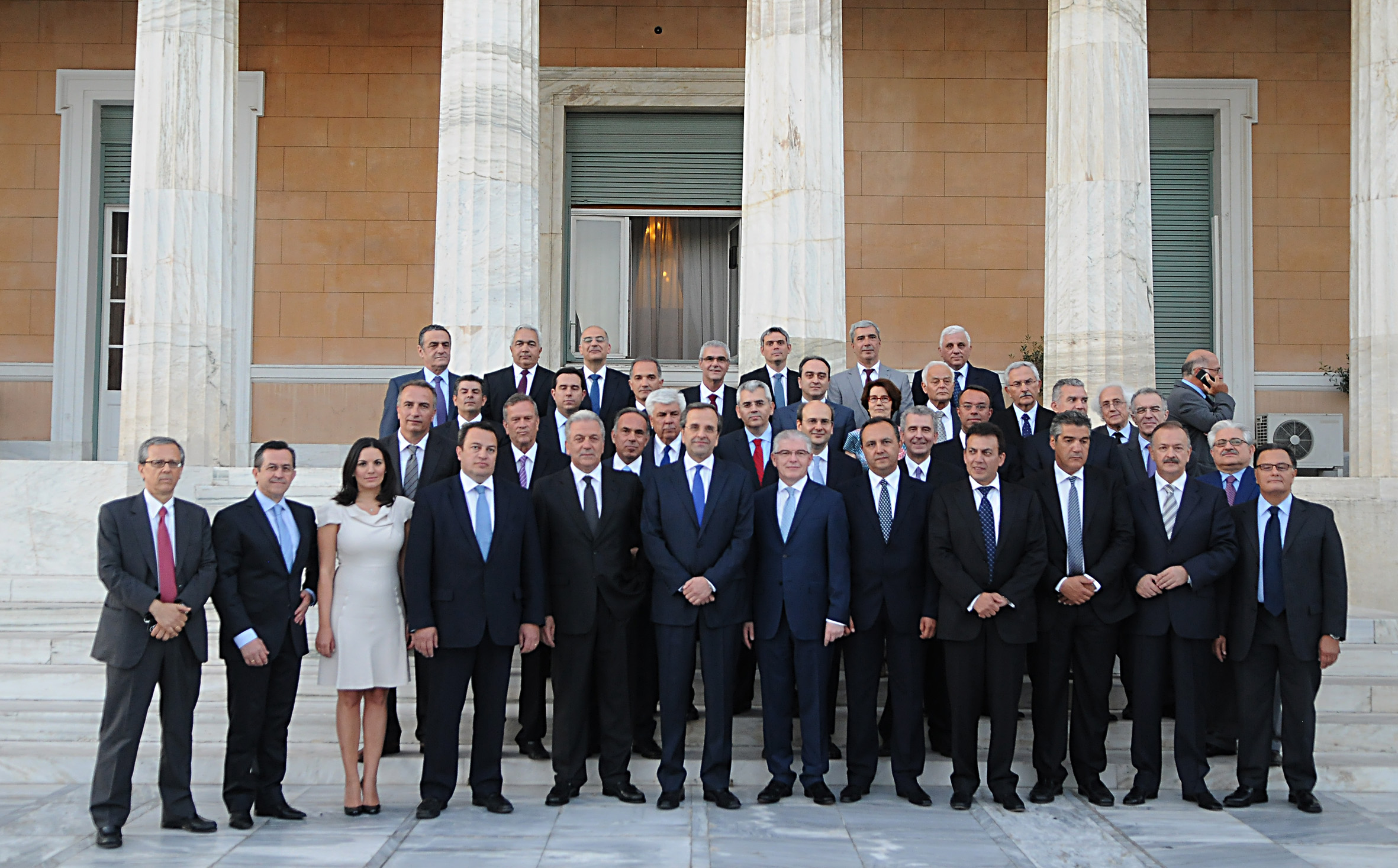 Ο ΠΡΩΘΥΠΟΥΡΓΟΣ ΑΝΤ.ΣΑΜΑΡΑΣ ΚΑΙ Η ΚΥΒΕΡΝΗΣΗ